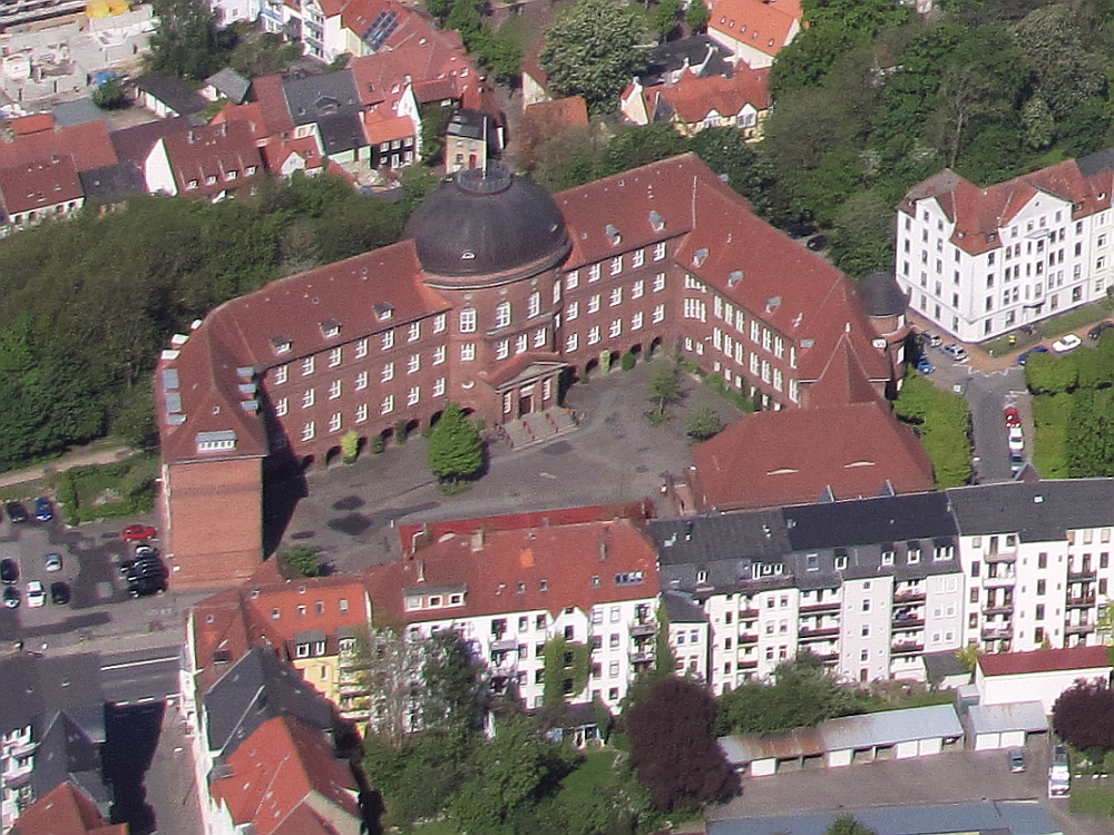 Luftbild vom Kulturdenkmal Goethe-Schule (Gymnasium) in der Bismarckstraße 41 in Flensburg-Jürgensby, Schleswig-Holstein - Foto Wolfgang Pehlemann Steinberg/Ostsee IMG 6188